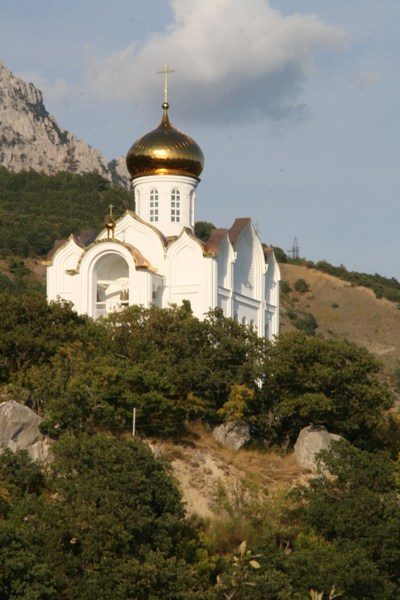 Казанский собор в Кастрополе, Крым, Украина